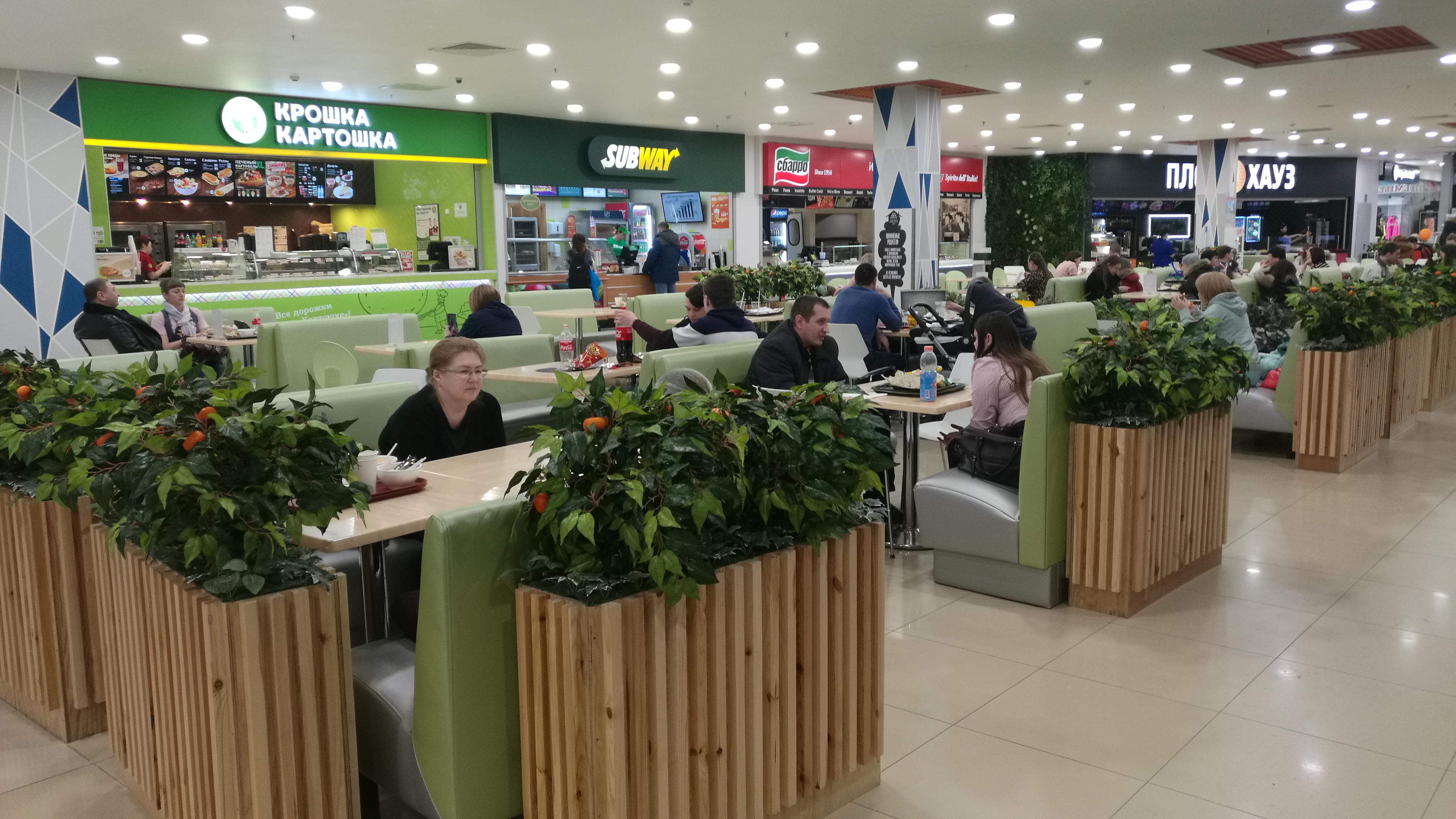 Manĝokorto en la aĉetcentro "Premier". Tjumeno, Rusio.